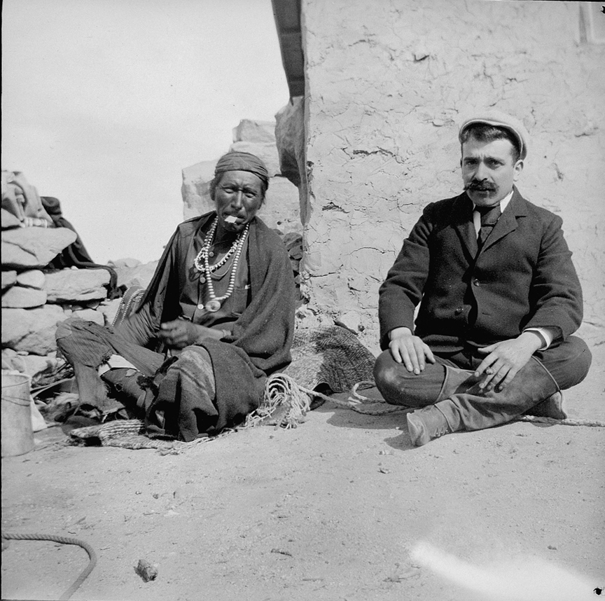 Aby Warburg Pueblo 1896